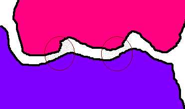 تصویرجوش سرد